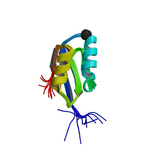 Proteïna ATP7A